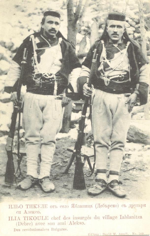 Ильо Наумов от Ябланица и Алексо Новов от Нерези.